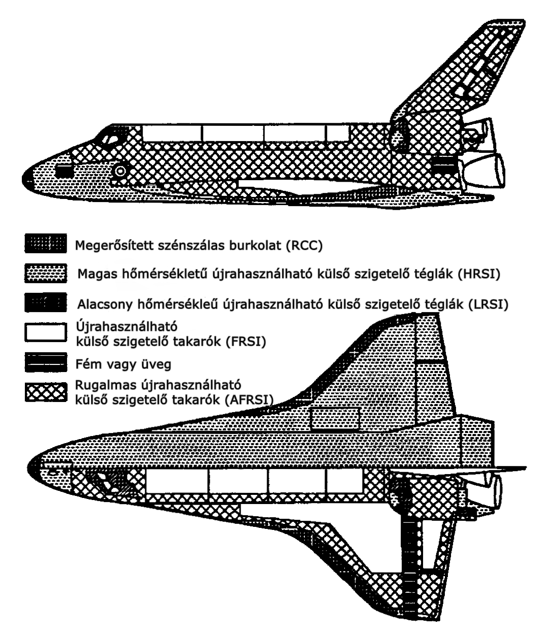 A Space Shuttle Orbiter hővédő pajzsának kialakítása